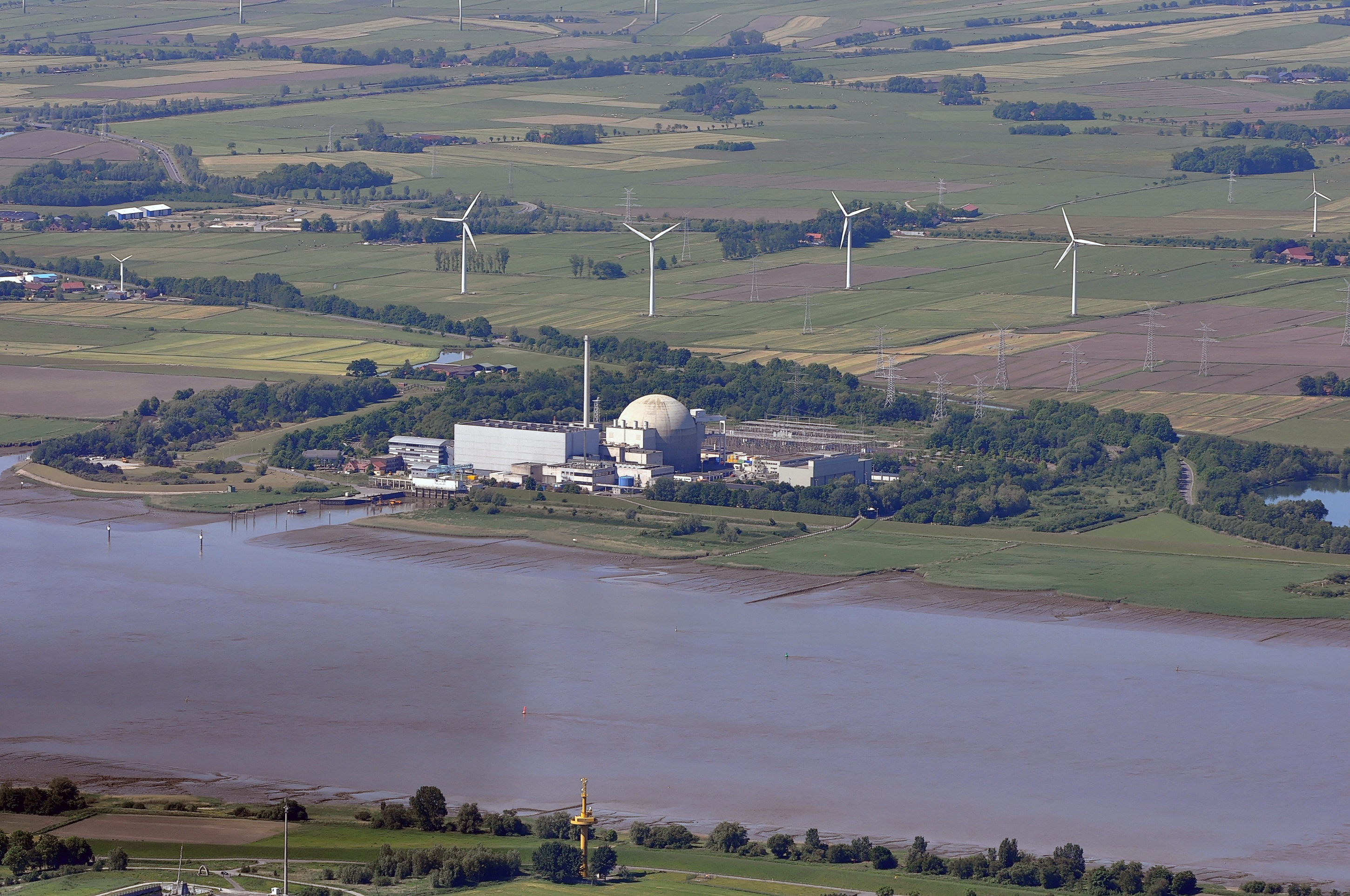 Kernkraftwerk Unterweser. Luftbilder von der Nordseeküste 2012-05